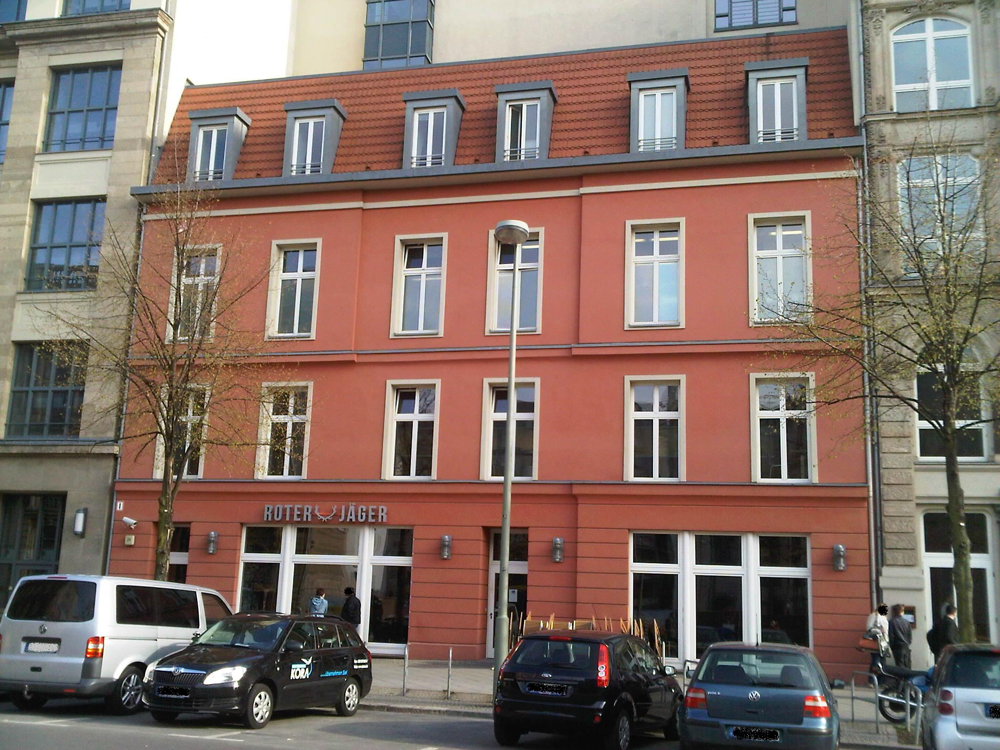 Rachs Restaurantschule "Roter Jäger" aus der zweiten Staffel 2012 in der Jägerstraße in Berlin-Mitte